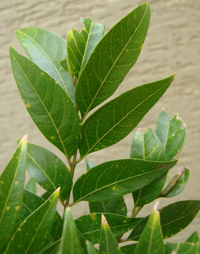 Sapindus saponaria - SAPINDACEAE - SQN 311 - Brasília - Distrito Federal - Brasil.